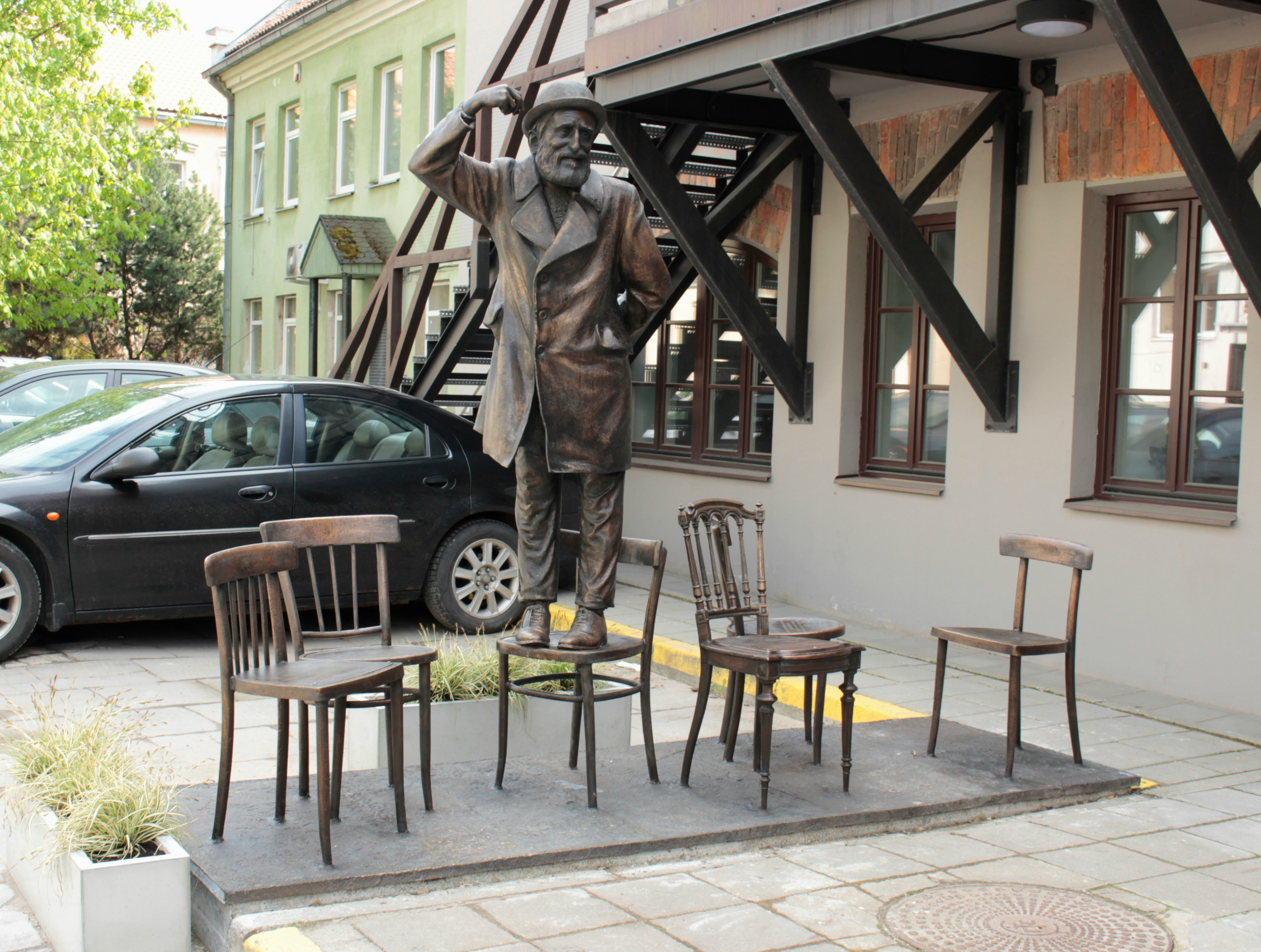 Abraomo Mapu paminklas Kaune